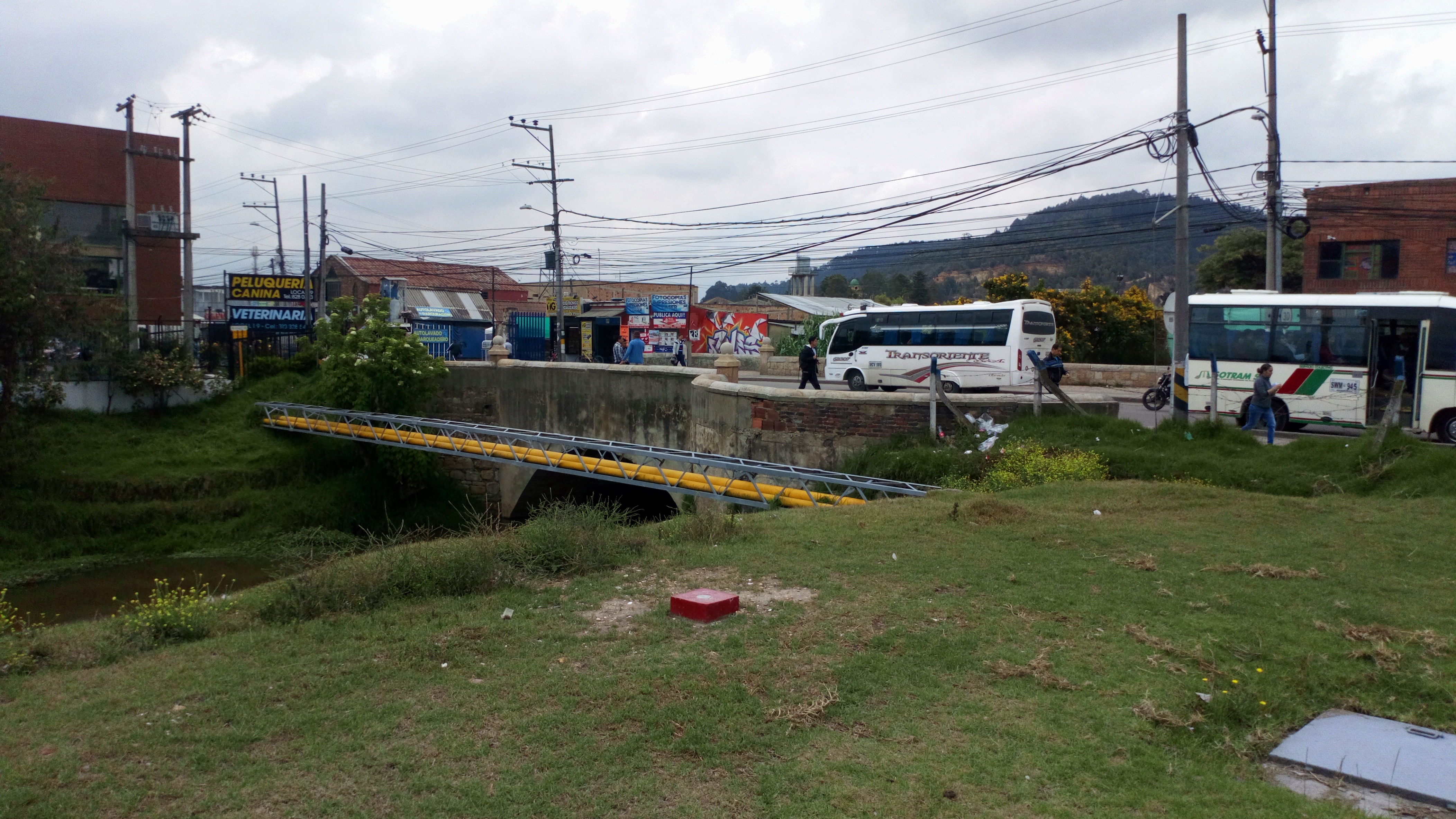 puentes de los españoles